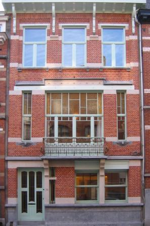 Architecte Emile Lambot, Rue Elise 34, Ixelles (Bruxelles)